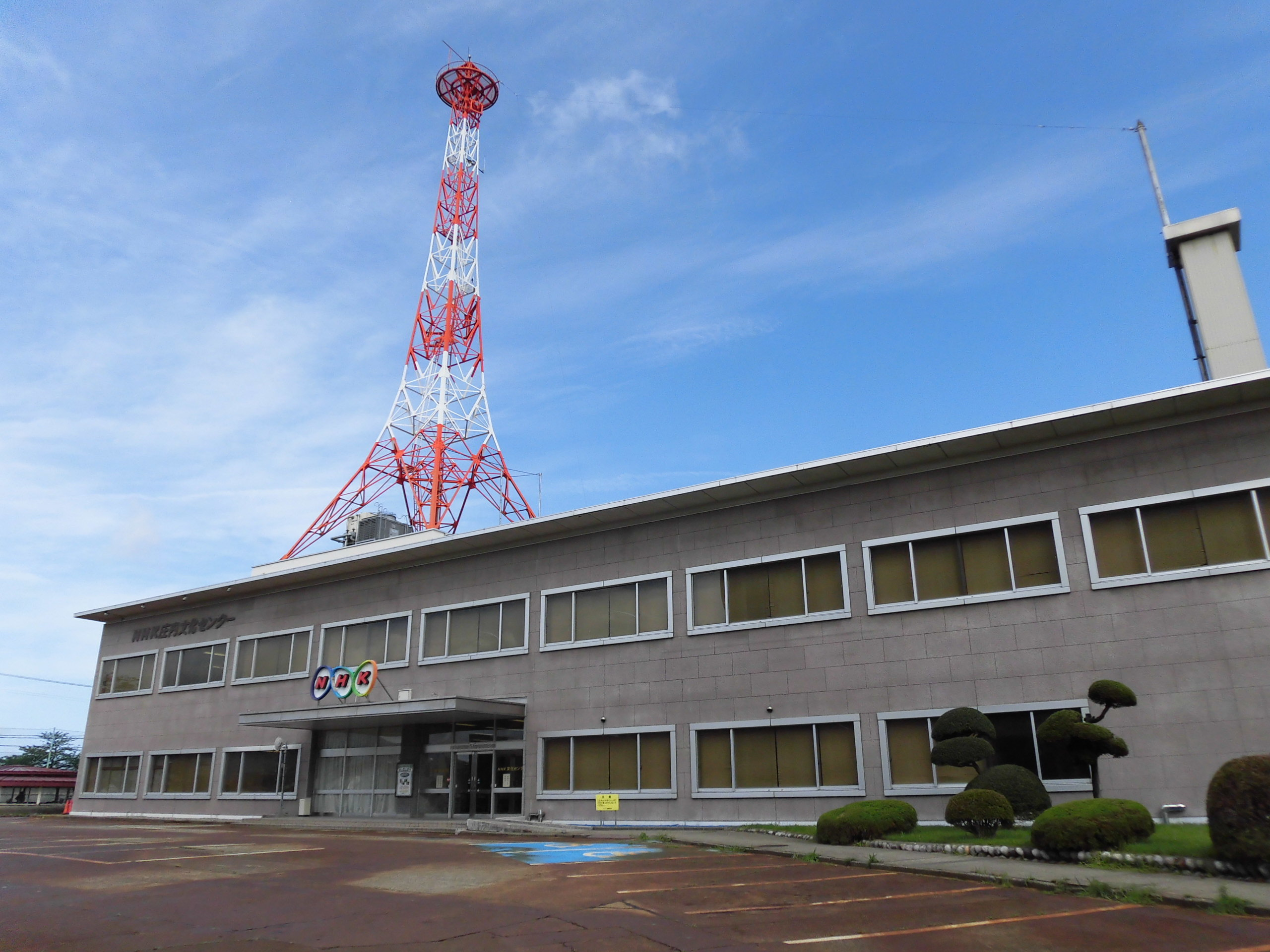 NHK山形放送局鶴岡支局。山形県鶴岡市上畑町に所在。旧・NHK鶴岡放送局（1988まで）。